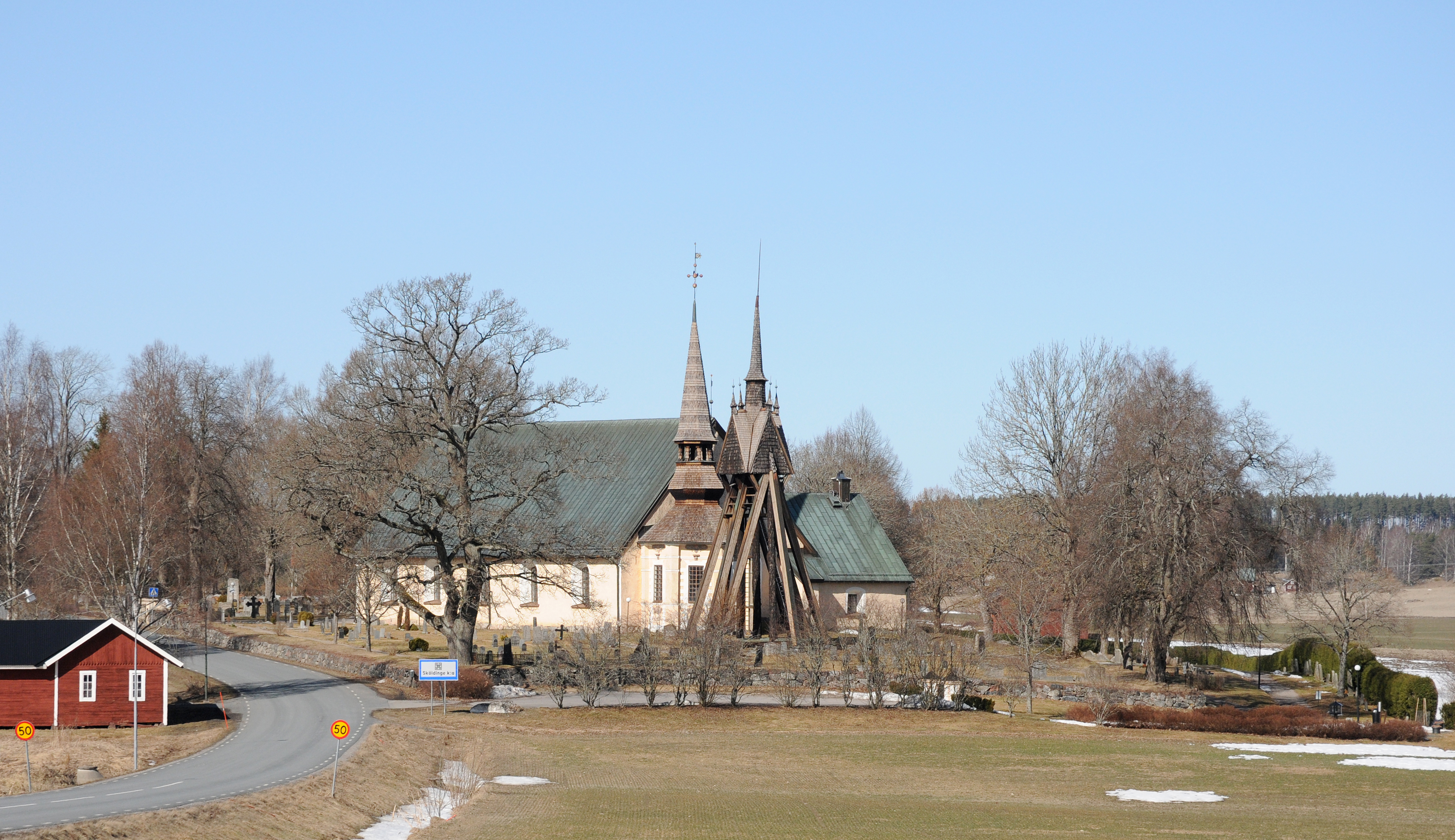 Sköldinge sockenkyrka